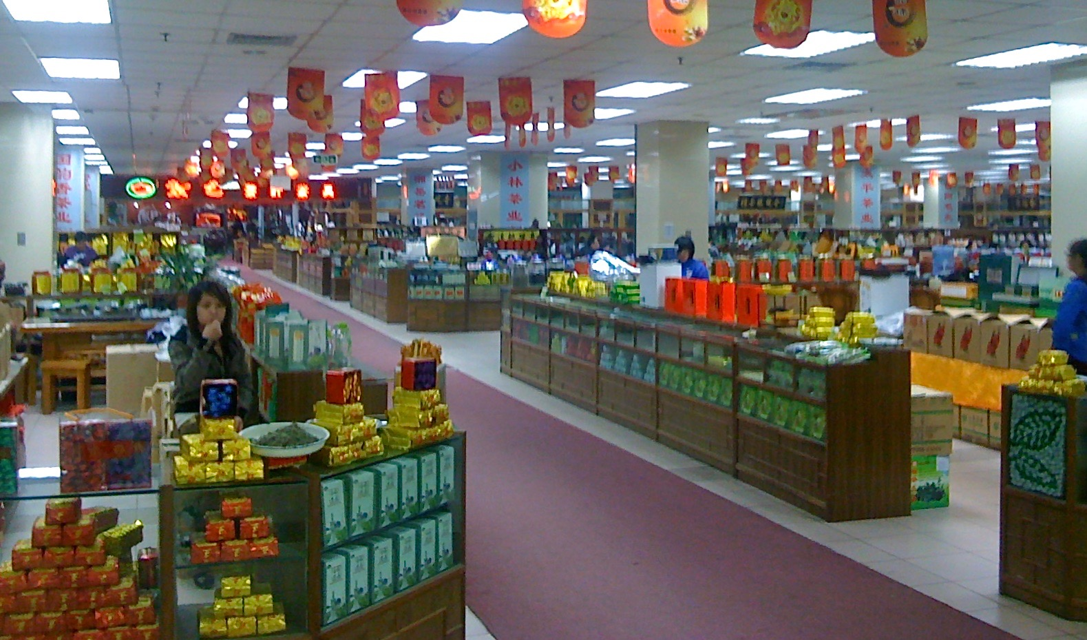 Temarknaden Maliandao i Peking